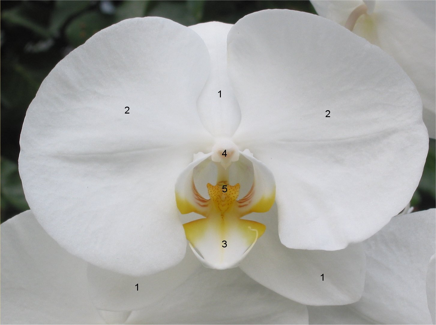 Phalaenopsis (vlinderorchidee) genummerd